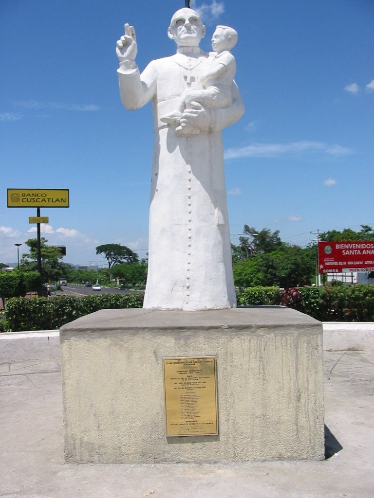 Monumento a Monseñor Oscar Arnulfo Romero en la ciudad de Santa Ana, El Salvador.